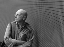 Retrato de Javier Mazorra